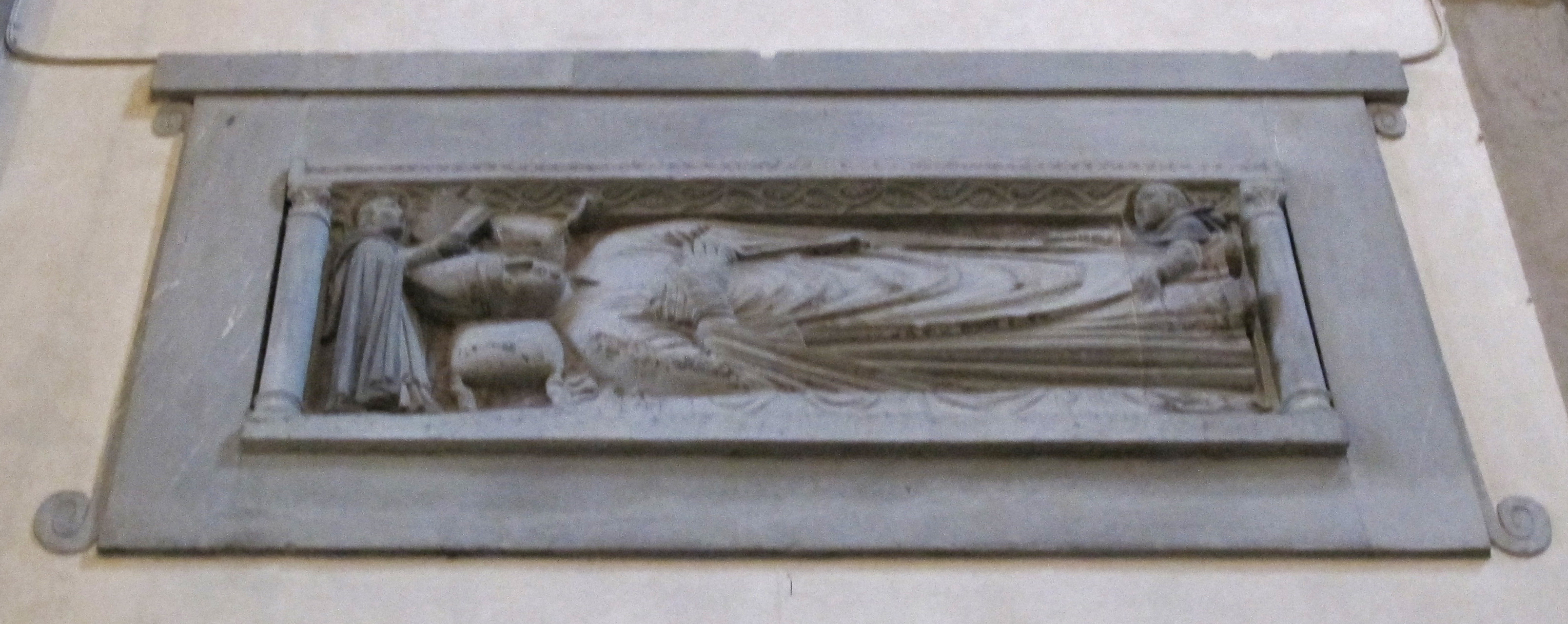 Smn, transetto dx, monumento a fra corrado gualfreducci della penna, vescovo di fiesole, 1312-42